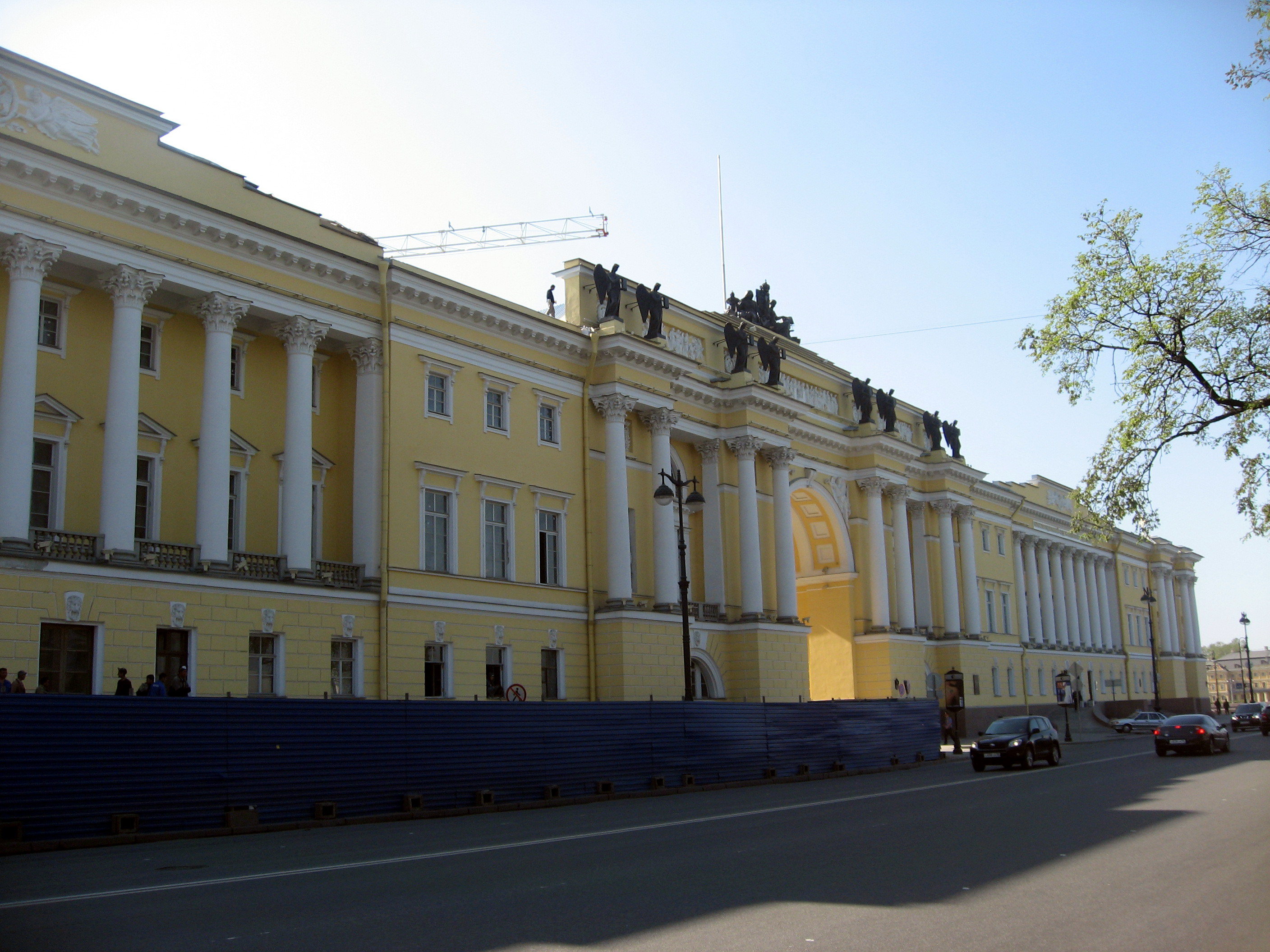 Sankt-Petěrburg